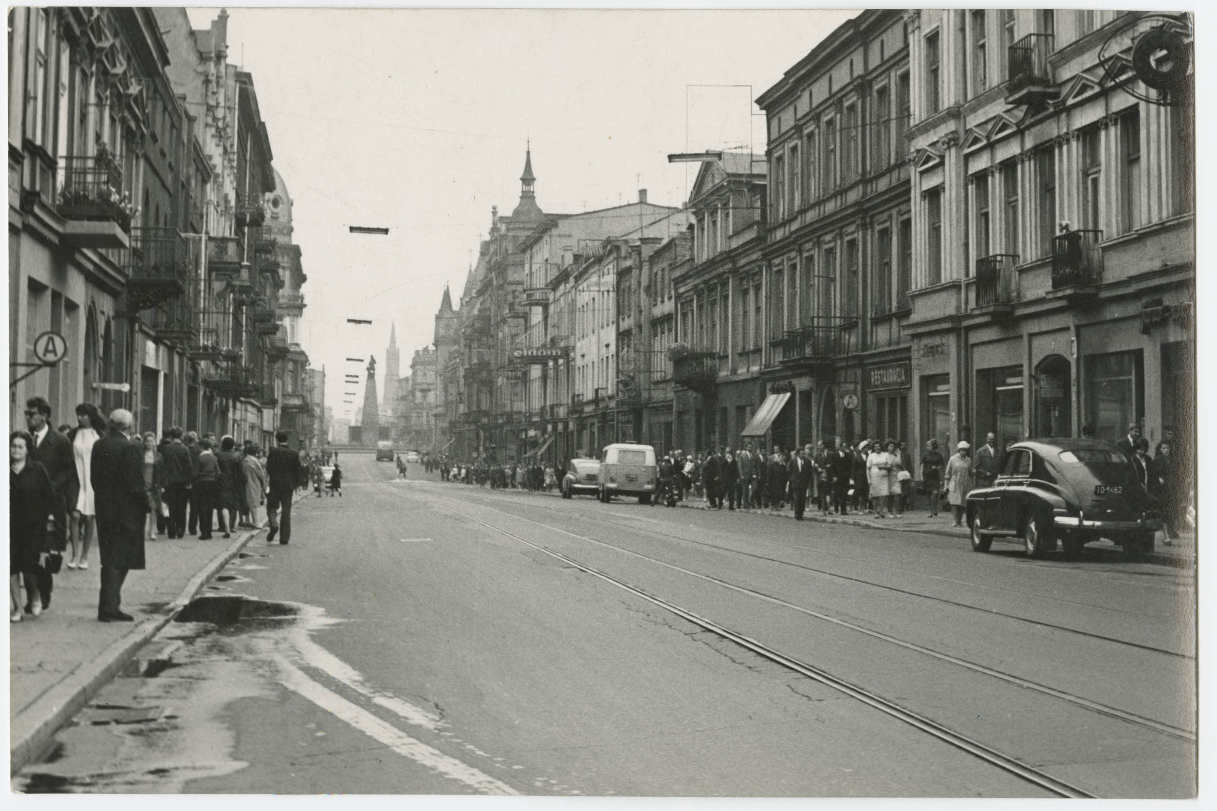 Fotografia przedstawia widok ulicy Piotrkowskiej od strony ulicy Więckowskiego w kierunku Placu Wolności. Widać tory, ponieważ w 1960 roku Piotrkowską kursowały tramwaje, potem linie zostały przeniesione na sąsiednią ulicę Zachodnią, natomiast torowisko pozostało jeszcze przez kilka lat. Pod numerem 24, po prawej stronie jest widoczna restauracja z dancingiem "Peszt". Po tej samej stronie widać neon „Eldomu”, oferującego artykuły AGD. W oddali znajduje się pomnik Tadeusza Kościuszki, pierwszy raz odsłonięty 14 grudnia 1930 roku. Po agresji Niemiec na Polskę w listopadzie 1939 roku niemieckie władze okupacyjne zburzyły pomnik. Po wojnie odbudowany przy współpracy z twórcą pierwszej rzeźby, Mieczysławem Lubelskim i powtórnie odsłonięty 21 lipca 1960 roku.